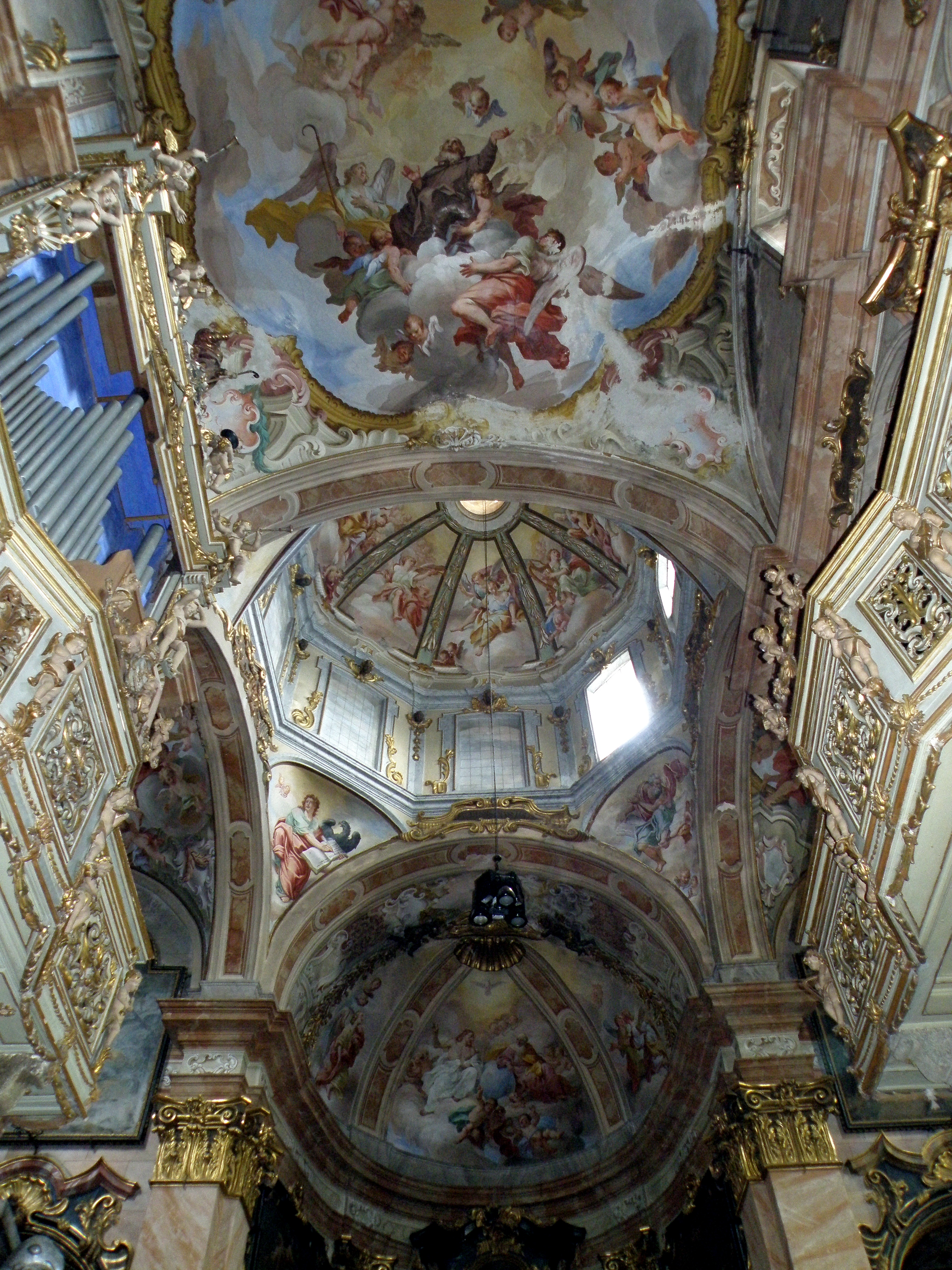 Orta San Giulio (NO). Isola di San Giulio, basilica, vista interna.